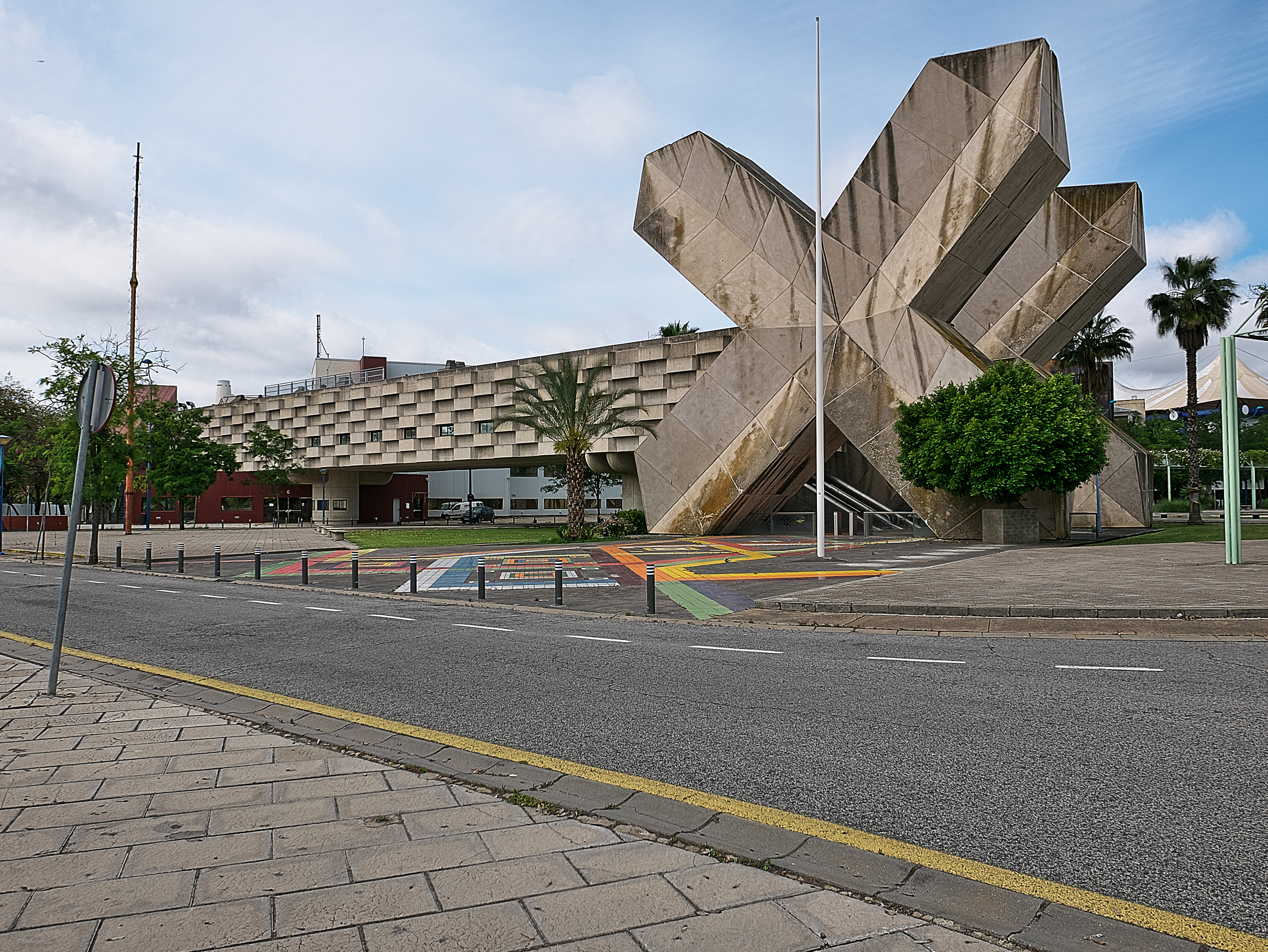 Pabellón de México en la Expo'92 Sevilla. Proyecto de Pedro Ramírez Vázquez.